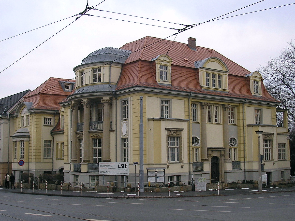 Simsonsche Villa, auch Porzellanschlösschen genannt, in der Friedrichstraße in Gotha (Thüringen).